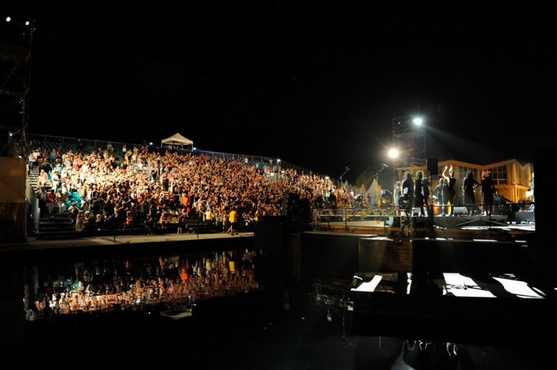 Le public et la scène du Canal St Sébastien à Martigues, vus d'une berge, lors d'un concert en été 2016